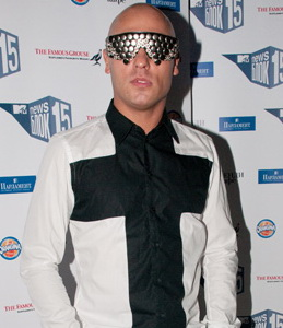 Певец Никита на праздновании 15-летия программы News Блок на MTV Россия